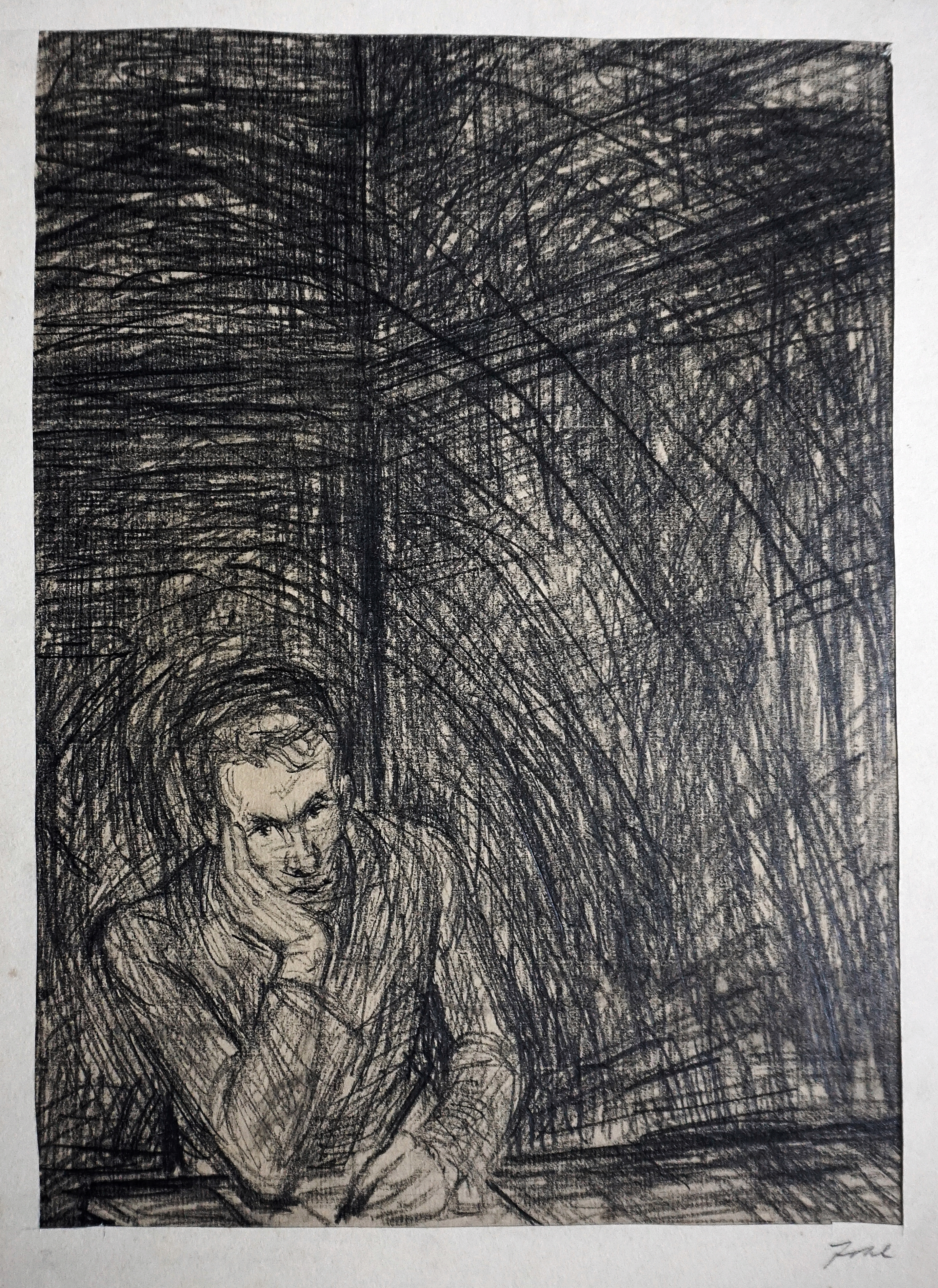 Günter Johl, Selbstporträt, vor 1965, Bleistiftzeichnung, signiert unten rechts mit "Johl". Die Zeichnung befindet sich im Besitz der Tochter des Künstlers, Amadee Vorsteher-Johl.